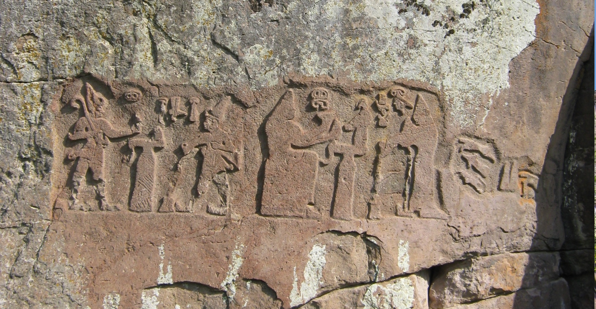 Firaktin, Hethitisches Relief bei Kayseri, Türkei